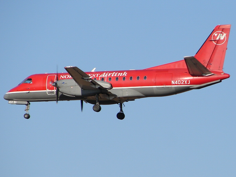 "Mesaba 2718" landing LSE